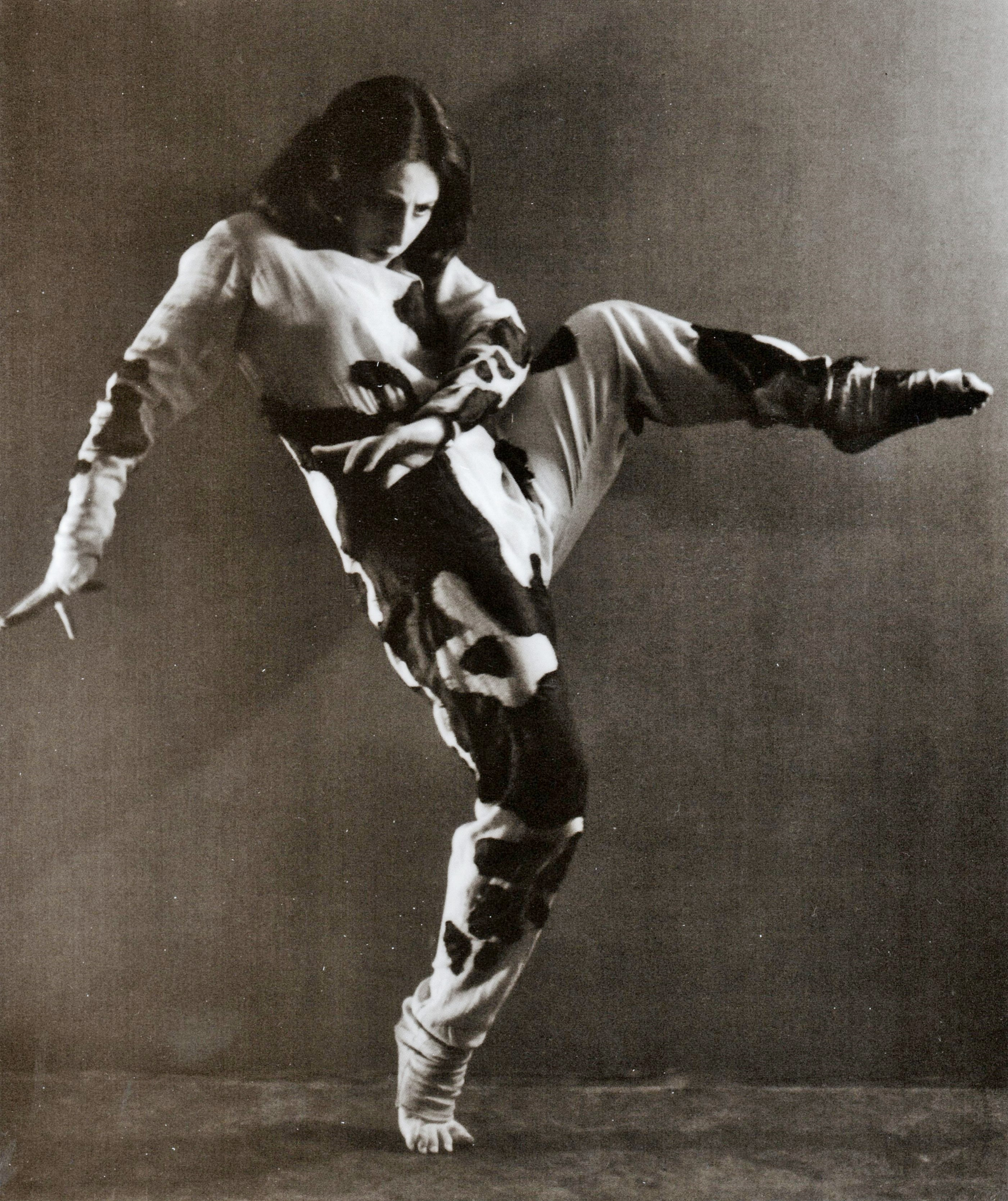 Martin Imboden 1893-1935, Schweizer Fotograf